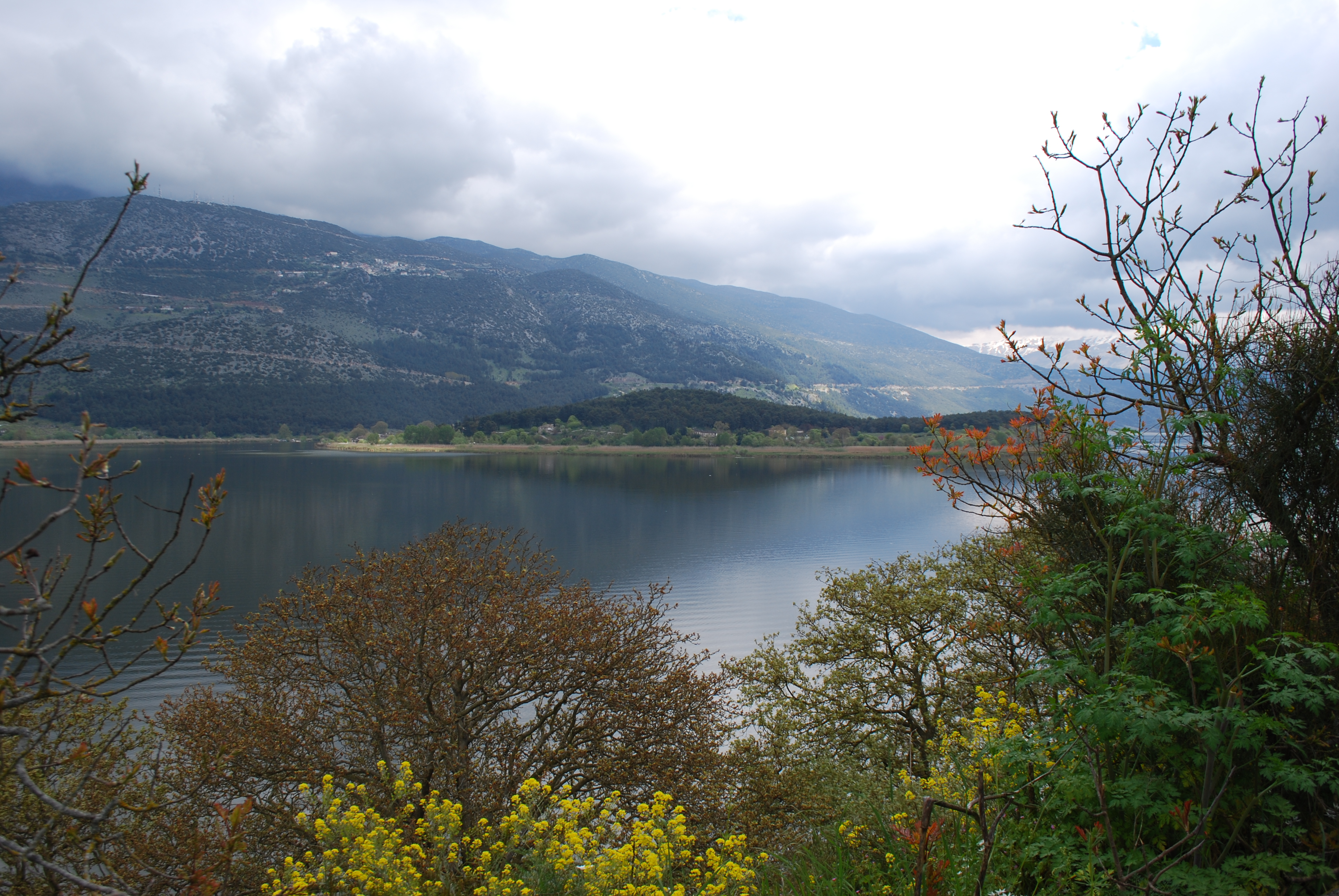 Vue de Ioannina, en Epire.